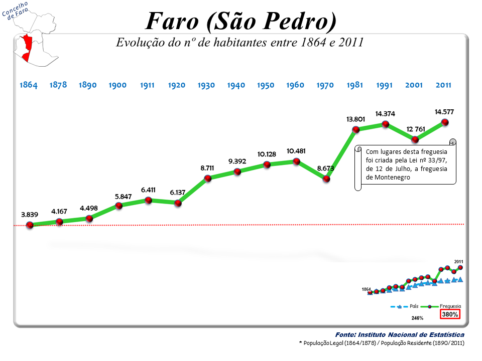 Censos 1864/2011